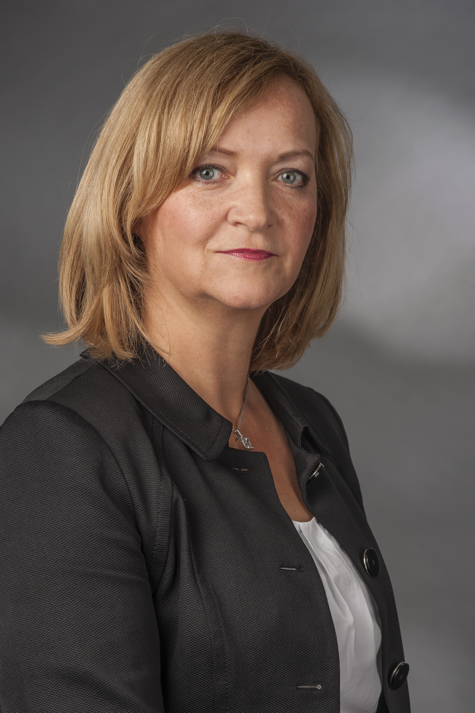 Simone Raatz (* 25. Dezember 1962 in Weimar) ist eine deutsche Politikerin (SPD) und Chemikerin. Sie war von 1999 bis 2009 Mitglied des Sächsischen Landtags. 2013 gelang ihr der Einzug in den Bundestag.